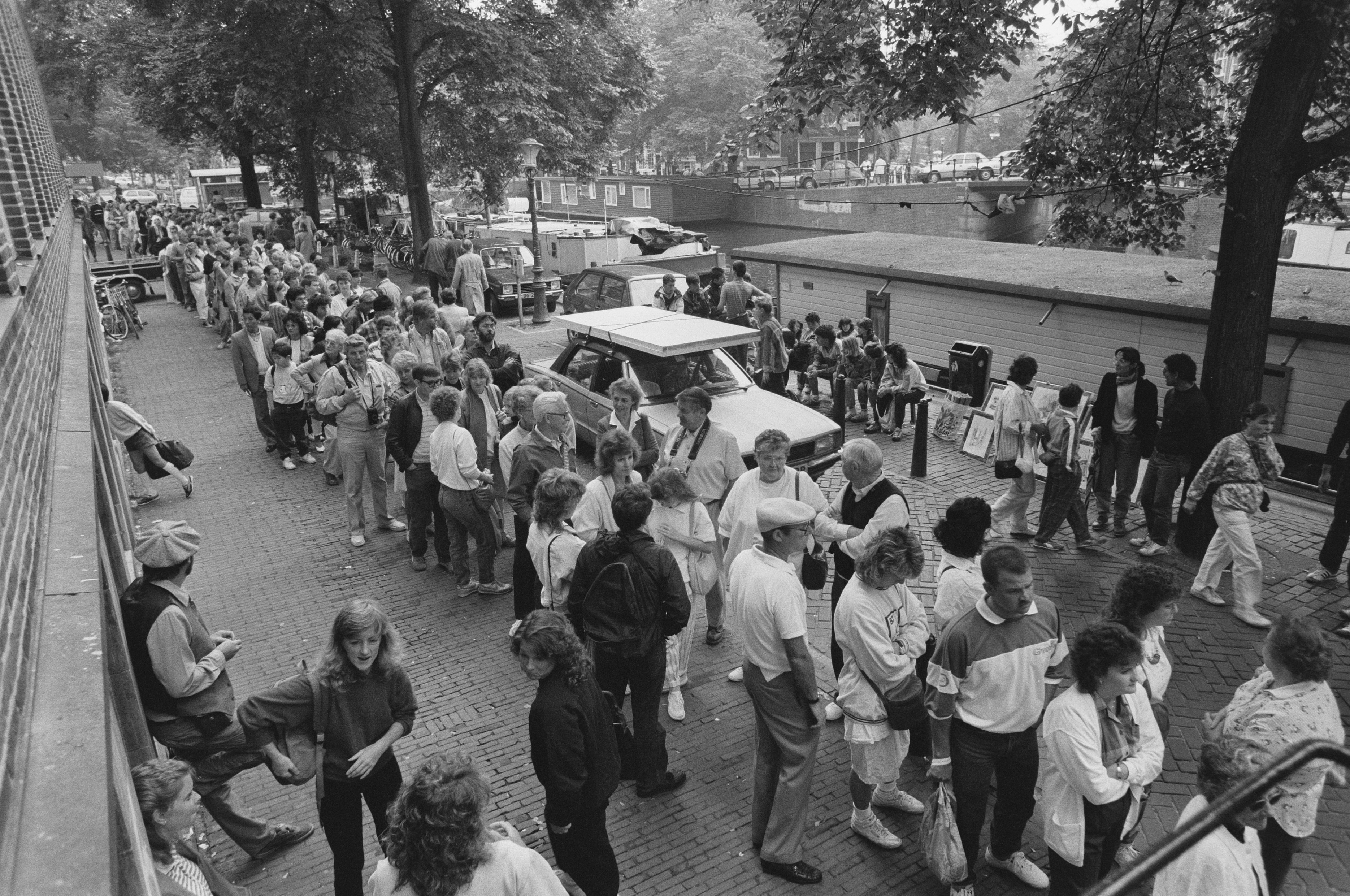 Collectie / Archief : Fotocollectie Anefo Reportage / Serie : [ onbekend ] Beschrijving : Rij toeristen voor Anne Frankhuis Datum : 12 augustus 1987 Trefwoorden : toeristen Instellingsnaam : Anne Frank Huis Fotograaf : Bogaerts, Rob / Anefo Auteursrechthebbende : Nationaal Archief Materiaalsoort : Negatief (zwart/wit) Nummer archiefinventaris : bekijk toegang 2.24.01.05 Bestanddeelnummer : 934-0490